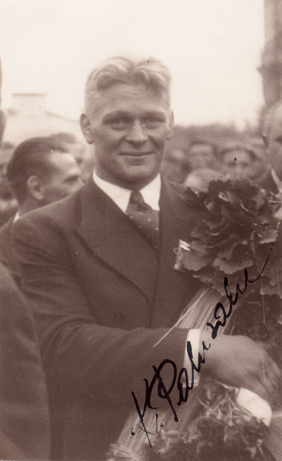 MuuseumikoguFotokoguOlemusfotoOriginaaloriginaalSäilivushea